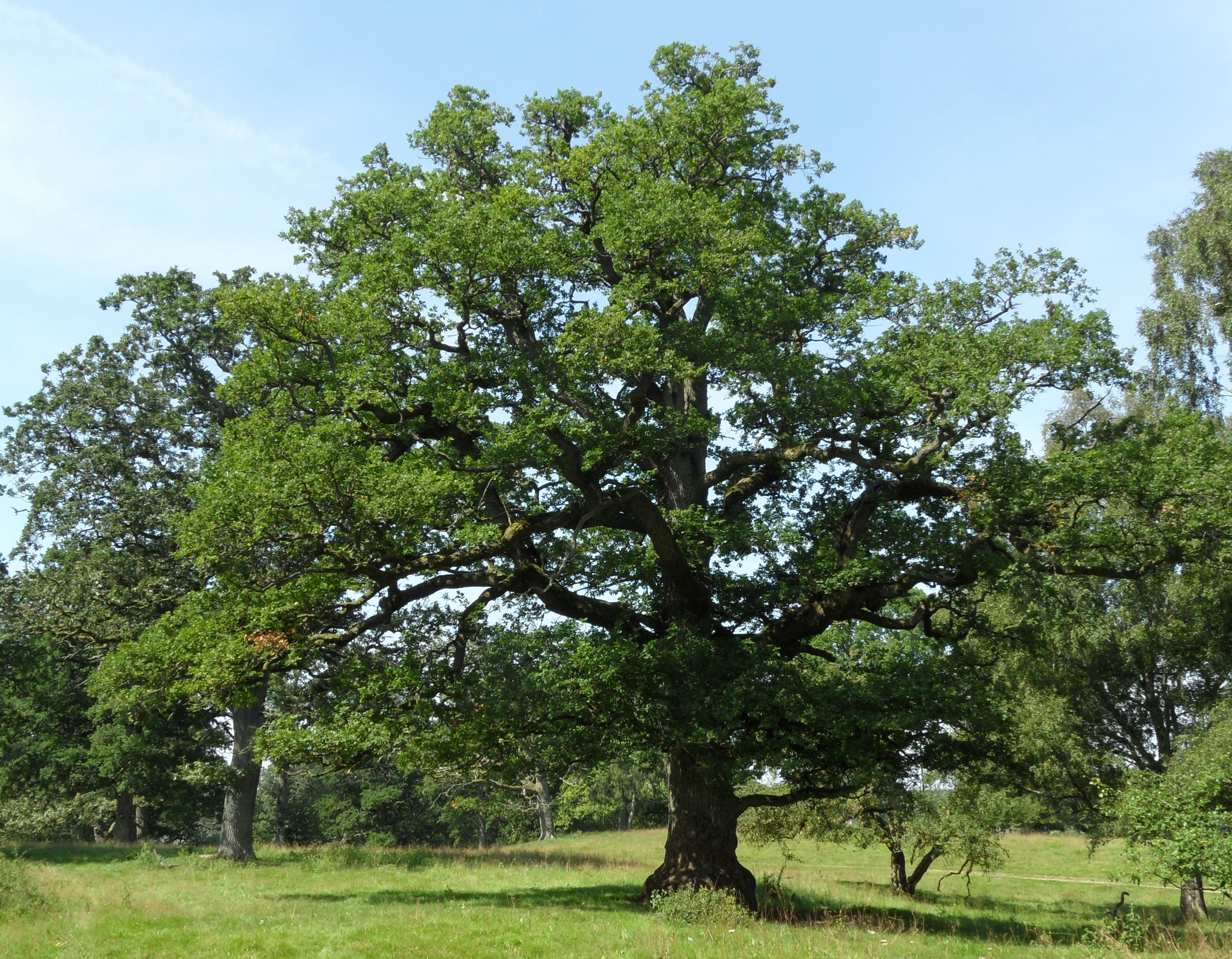 En av naturreservatet Maglö ekars ek, sommar